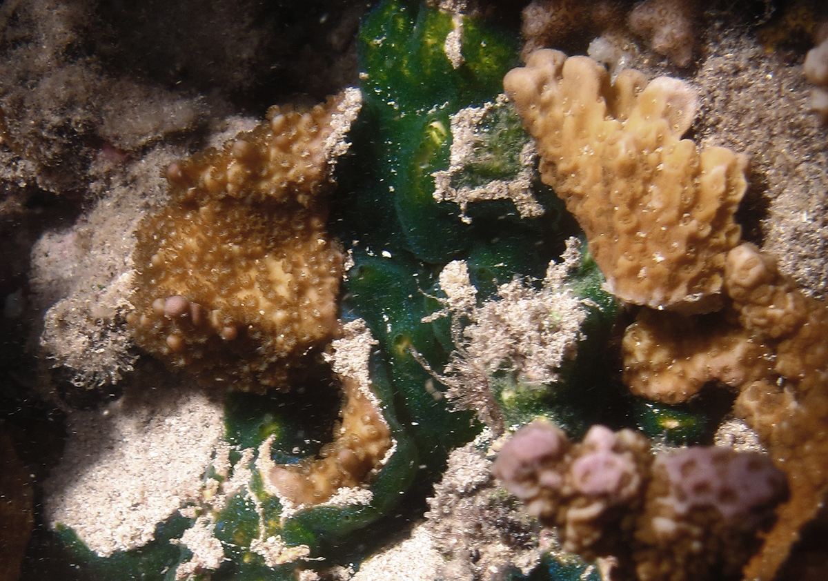 Une ascidie (peut-être Diplosoma simile) à la Réunion.